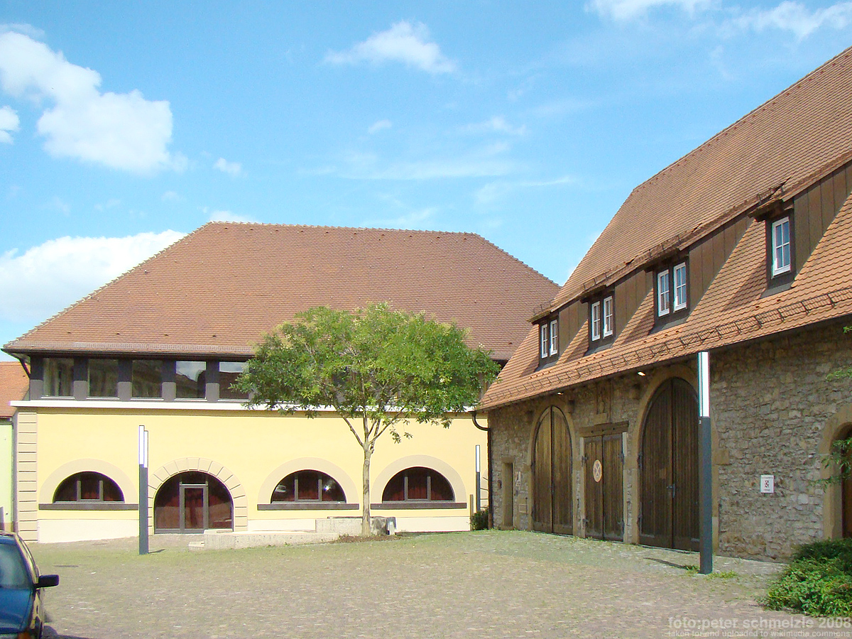 Ehem. Deutschordenshof mit Alter Kelter und Zehntscheune in Heilbronn-Sontheim